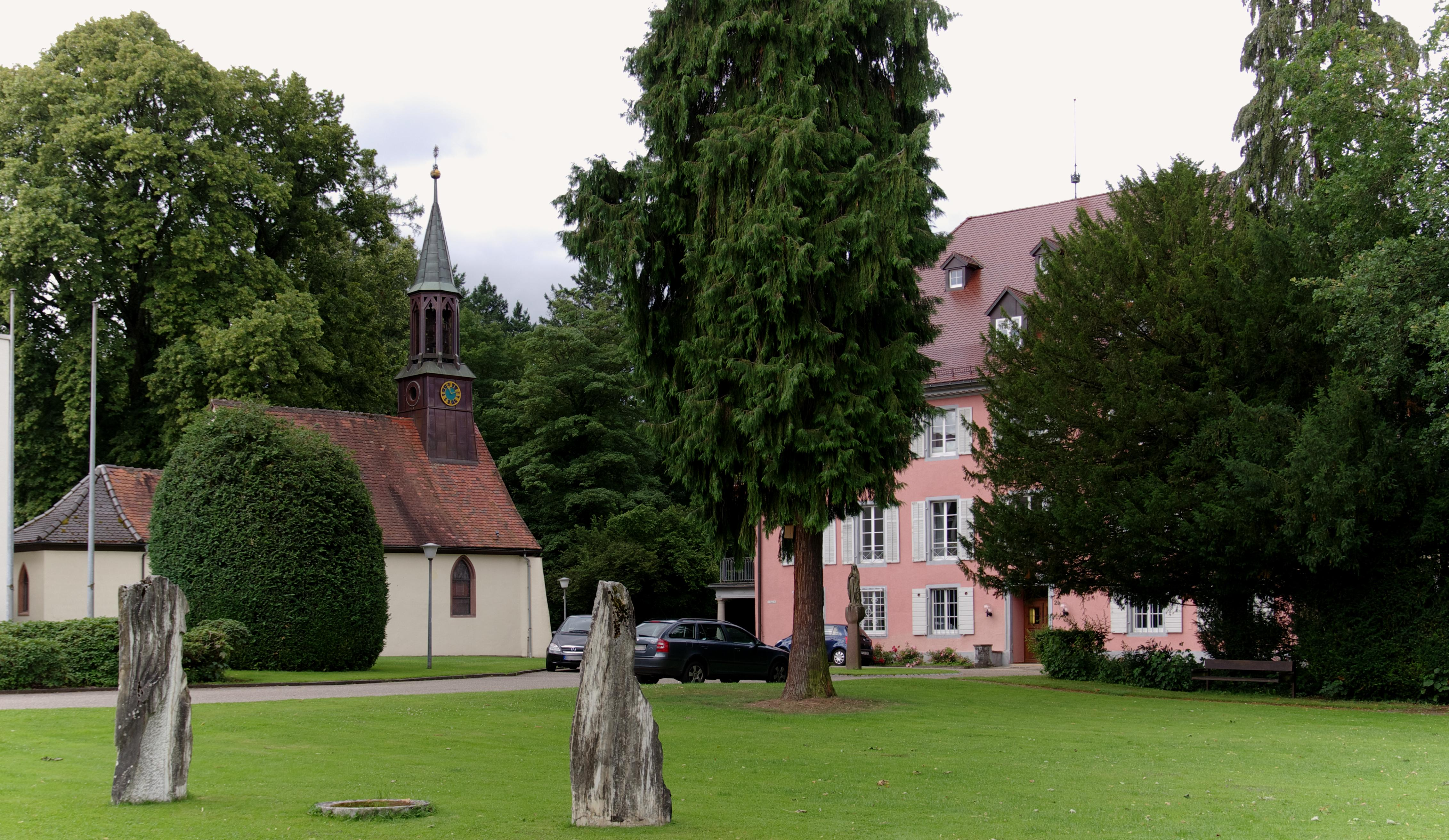 Schlosskapelle Stegen-Weiler Blick auf Schloss und Kapelle